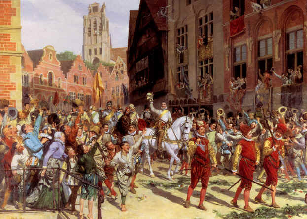 Prince Maurice in Dordrecht, after the Siege of Nieuwpoortlabel QS:Len,"Prince Maurice in Dordrecht, after the Siege of Nieuwpoort" label QS:Lnl,"Prins Maurits in Dordrecht, na de slag bij Nieuwpoort in 1600"